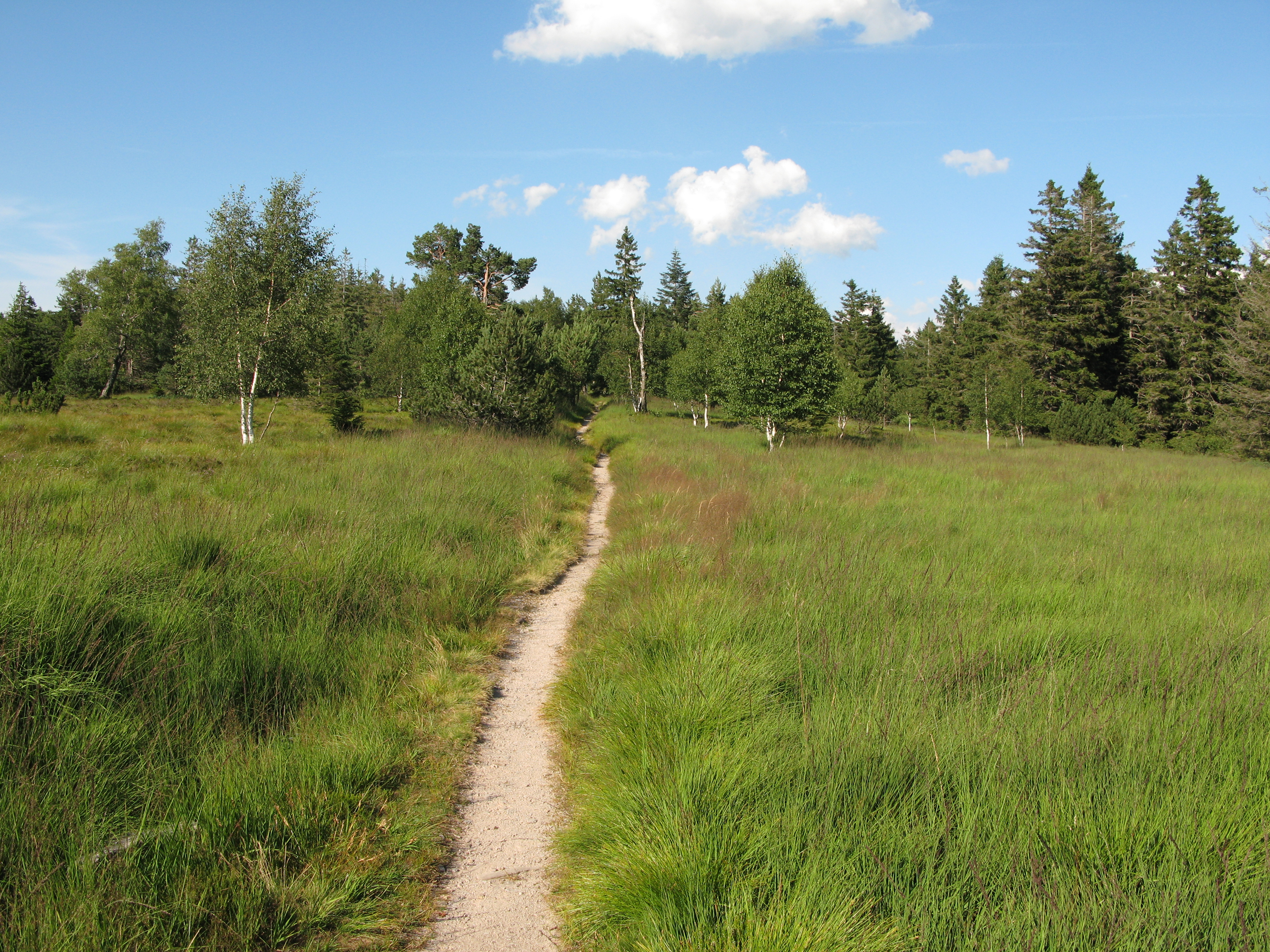 Auf dem Hochkopf und Pfrimmackerkopf am Westweg im Nordschwarzwald.